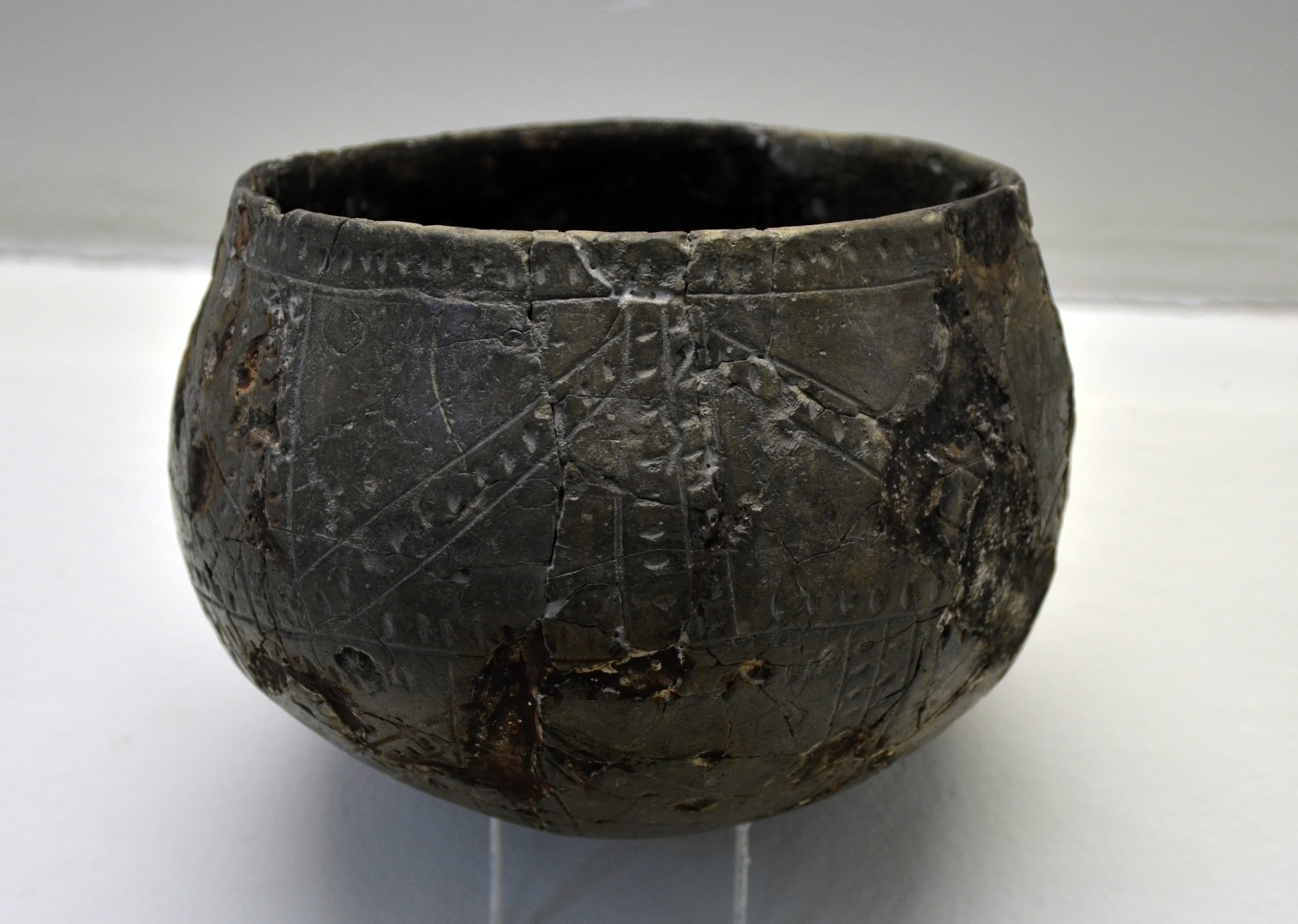 Vase à décor rubané, Néolithique ancien ( 6000 - 3500 - JC ), provenant de Nauroy ( Marne ). Musée Saint-Remi à Reims.